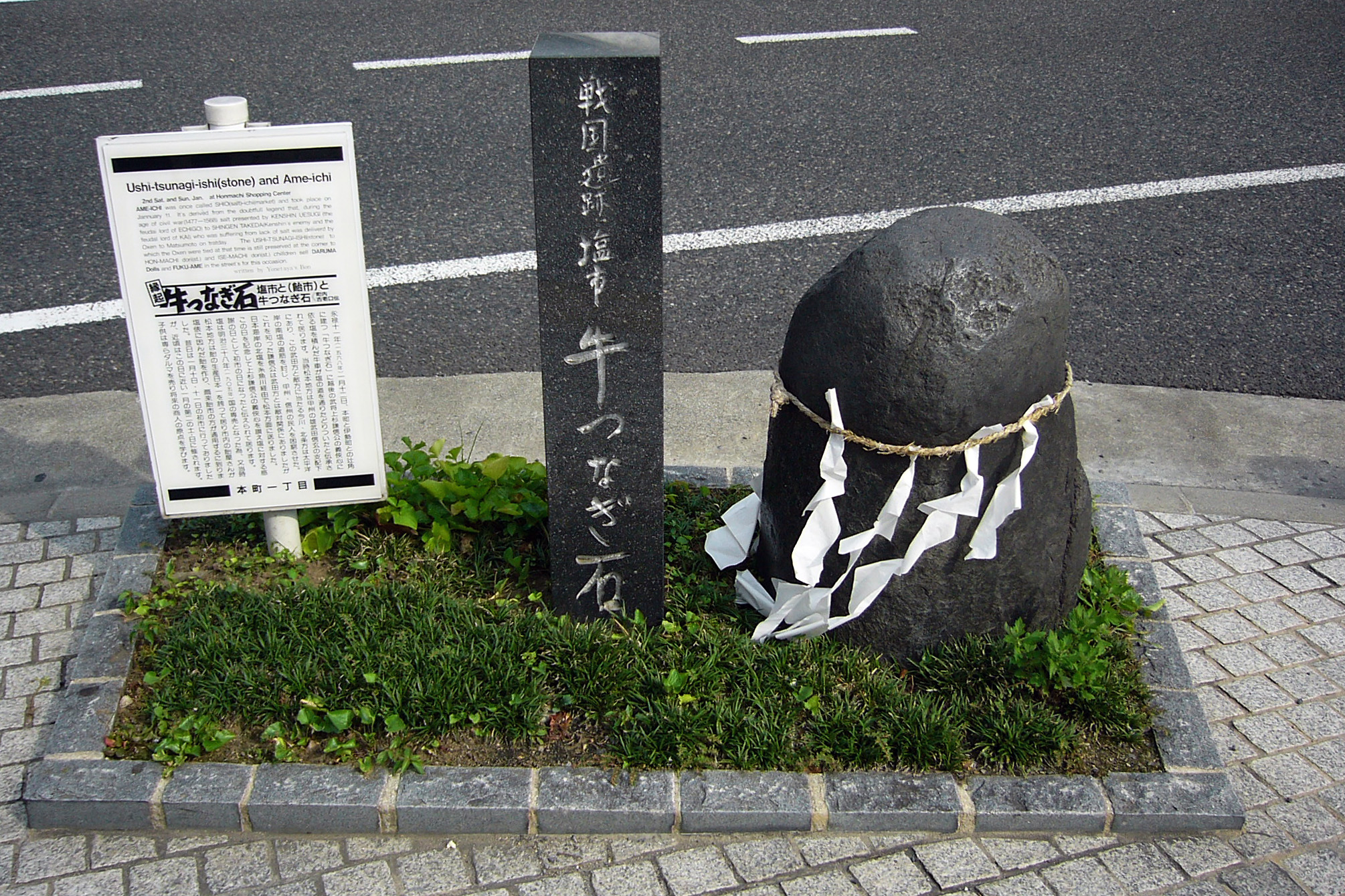 Ushi-Tsunagi-Ishi in Matsumoto, Nagano prefecture, Japan